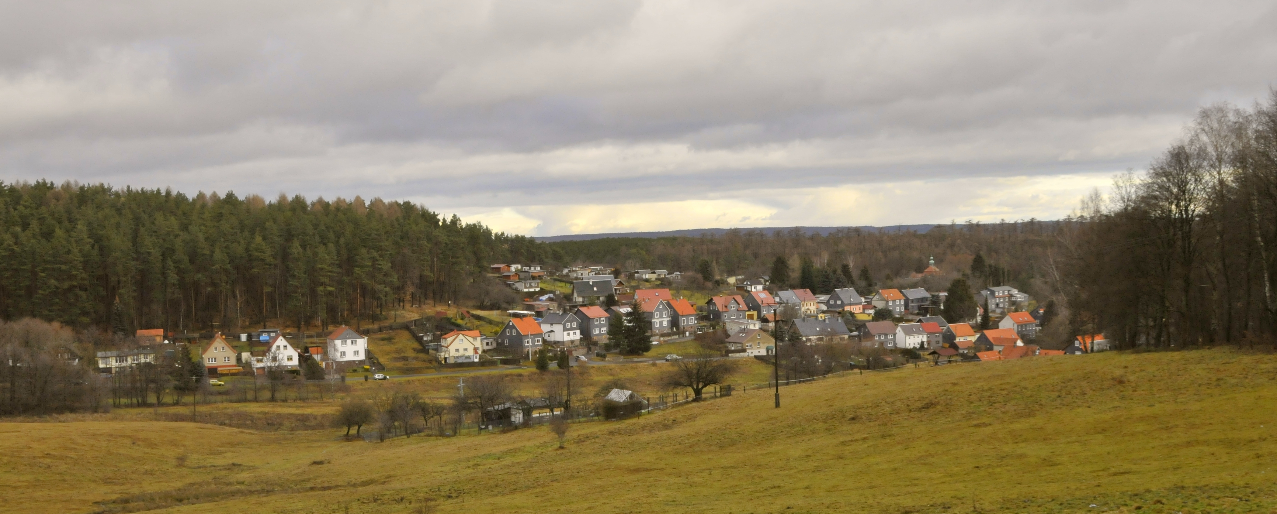 Frankenhain, Ortsansicht von Südwesten